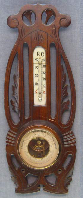 Jugendstil Barometer mit Thermometer für den Hausgebrauch mit Wandmontage